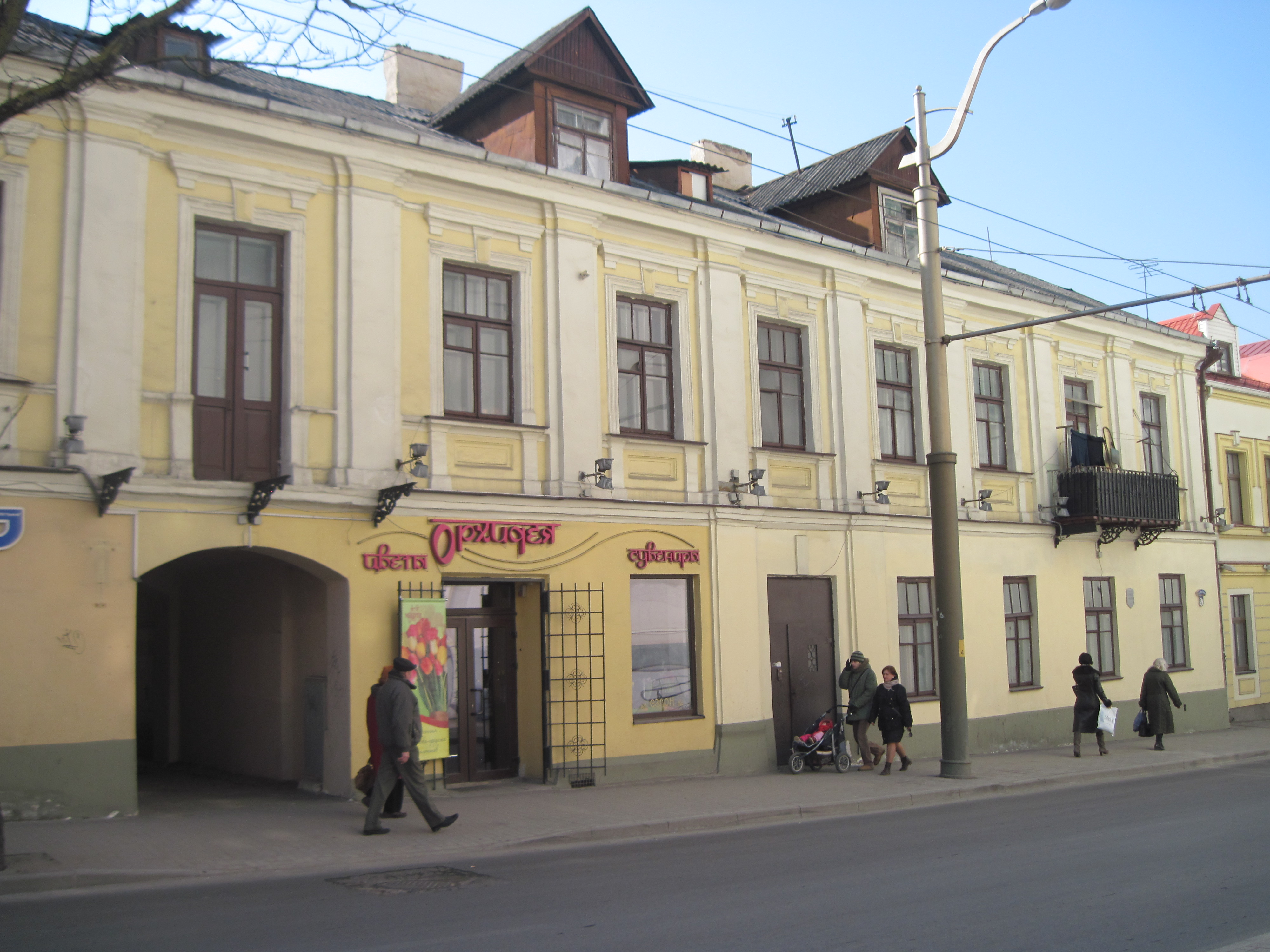 Забудова гістарычнага цэнтра Гродна. Вуліца К. Маркса, 5.